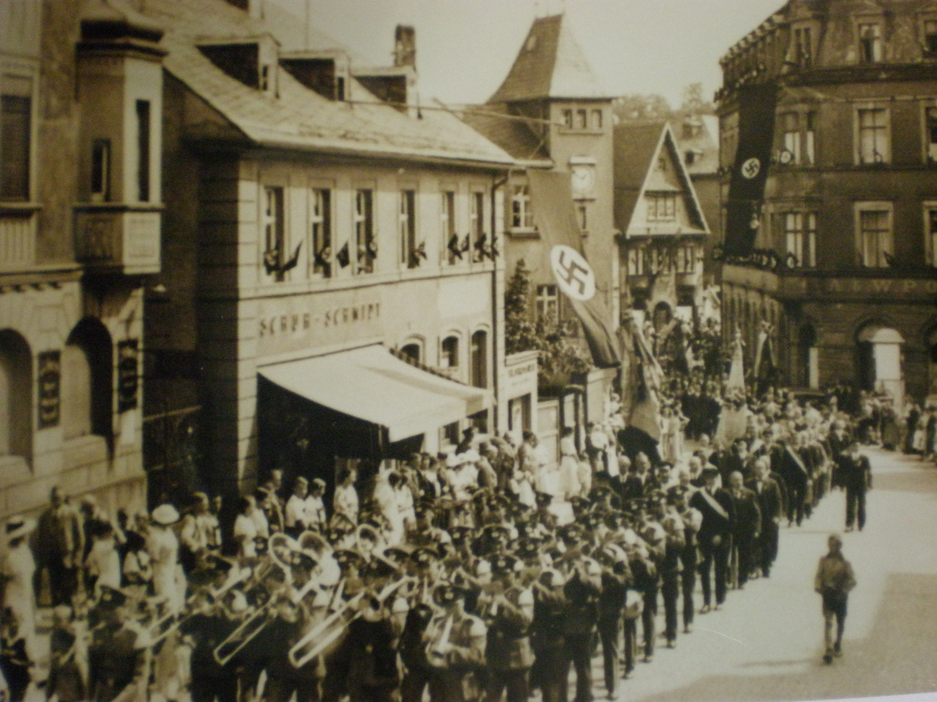 Ein Aufmarsch der Nationalsozalisten in Münchberg.